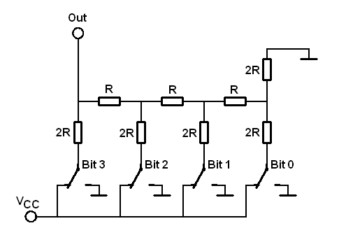 Schema eines R2R-Netzwerkes